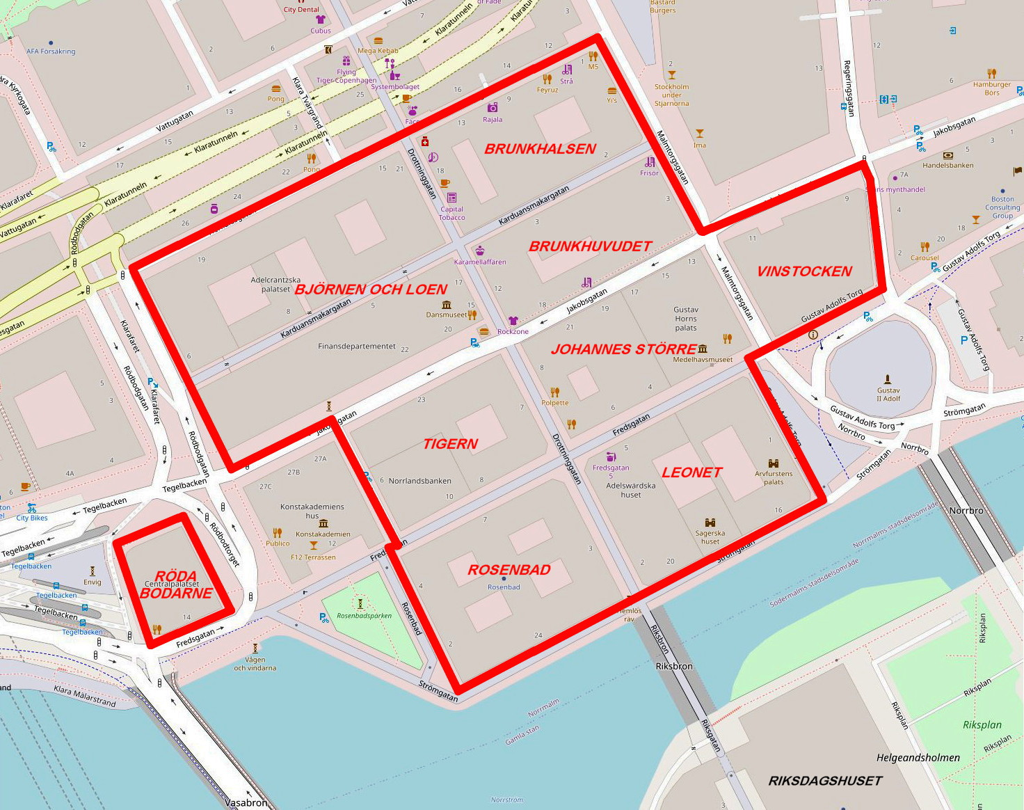 Stockholms regeringskvarter på Nedre Norrmalm